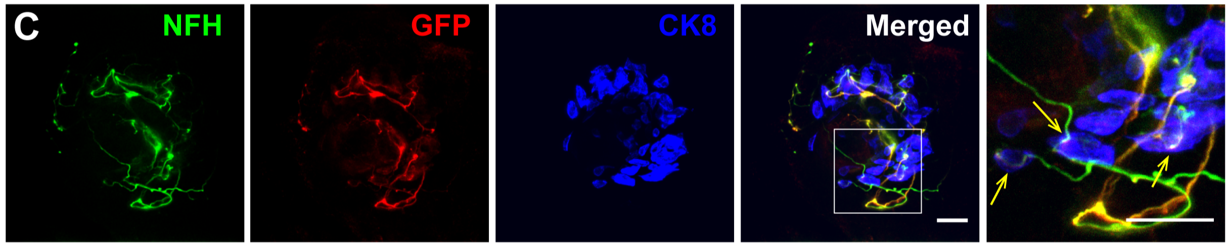 Figura 2. Las fibras NFH+ que inervan las células de Merkel son TrkC+. C) dos ejemplos representativos de domos táctiles con inervación de fibra GFP+. Casi todas las fibras NFH+ que inervan las células de Merkel son GFP+, que se indican con flechas amarillas. Barra de escala= 20 nm.